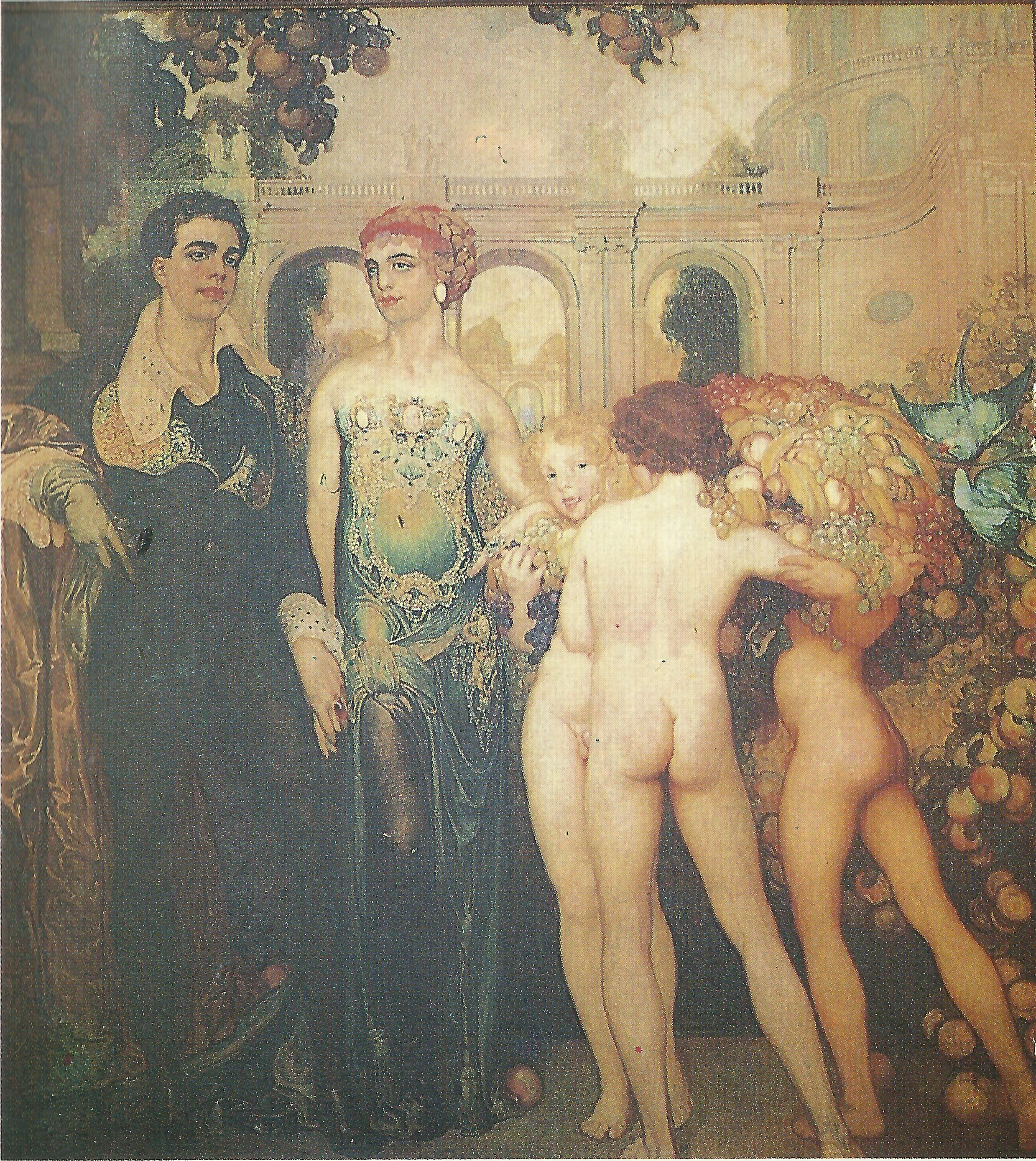 6. Epitalamio o Las bodas del príncipe Néstor, 1909, óleo sobre lienzo, 220 x 220 cm. (Museo Néstor).